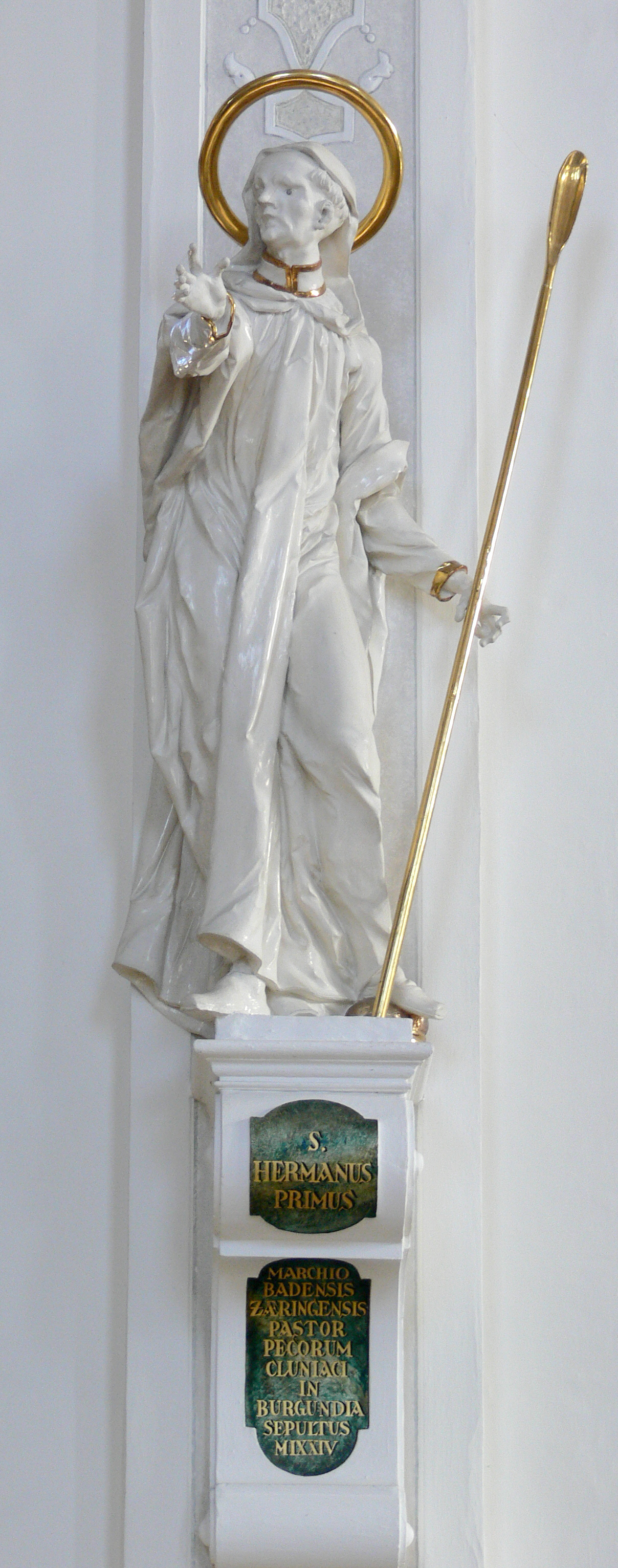 Pfarrkirche St. Peter (ehem. Klosterkirche St. Peter auf dem Schwarzwald) Joseph Anton Feuchtmayer: Stifterfigur Hermann I. von Baden, im Langhaus, 1731 Joseph Anton Feuchtmayer (1696–1770) Description German sculptor Date of birth/death6 March 16962 January 1770Location of birth/deathLinzMimmenhausen bei Salem (Baden)Work locationOberschwabenAuthority control VIAF: 69721226 LCCN: n84189350 GND: 118532707 ULAN: 500032217 ISNI: 0000 0000 6678 5681 WorldCat WP-Person